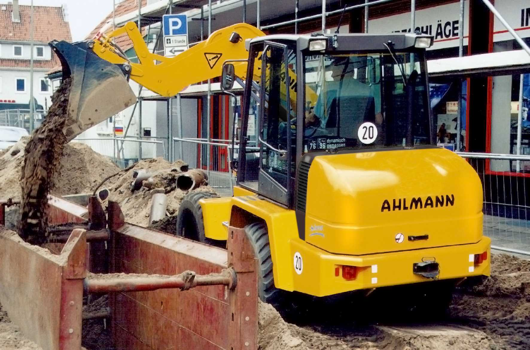 Ahlmann Schwenklader AS 90 beim Verfüllen eines Verbaus